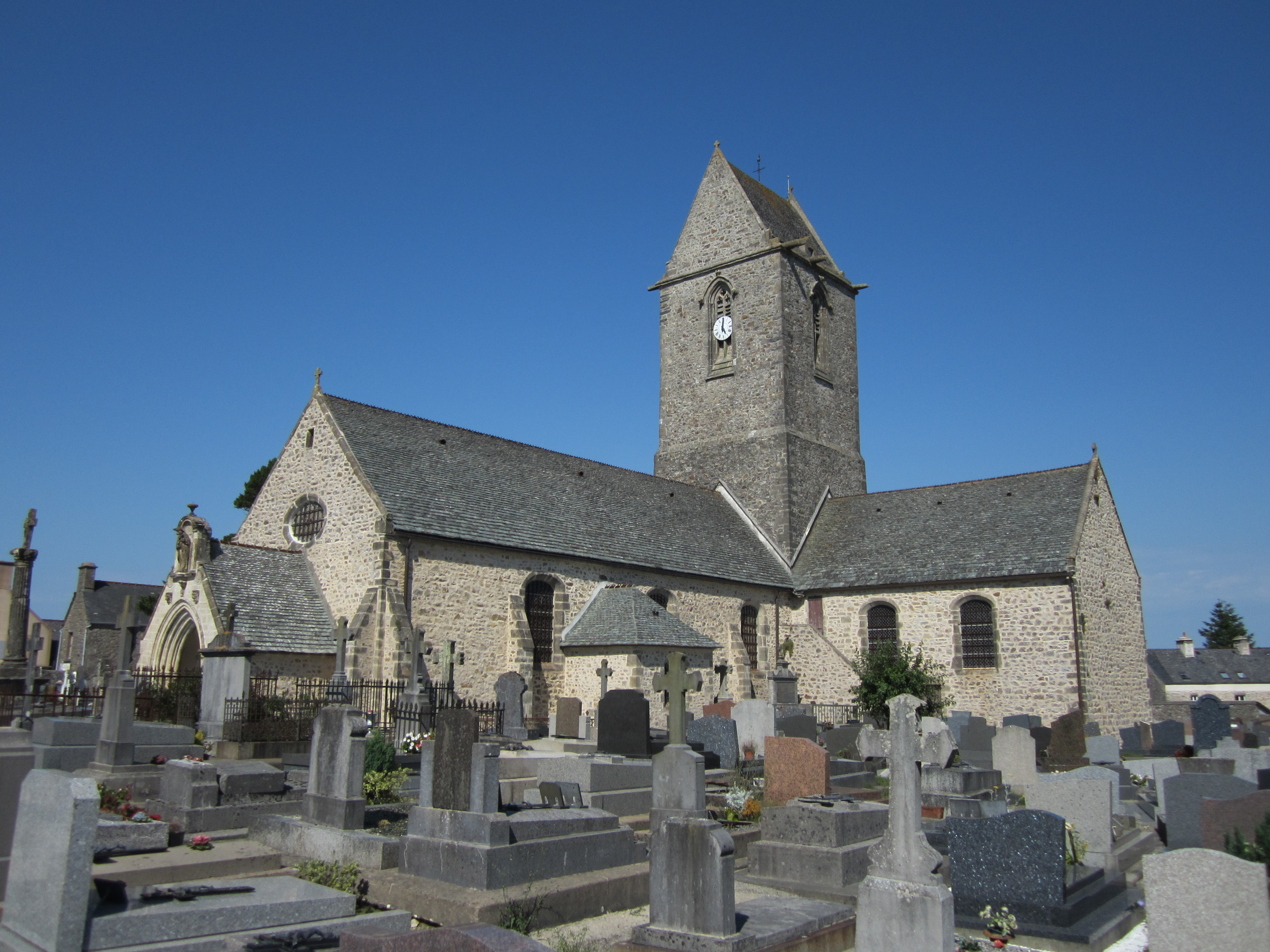 Église Notre-Dame de Brix, Manche